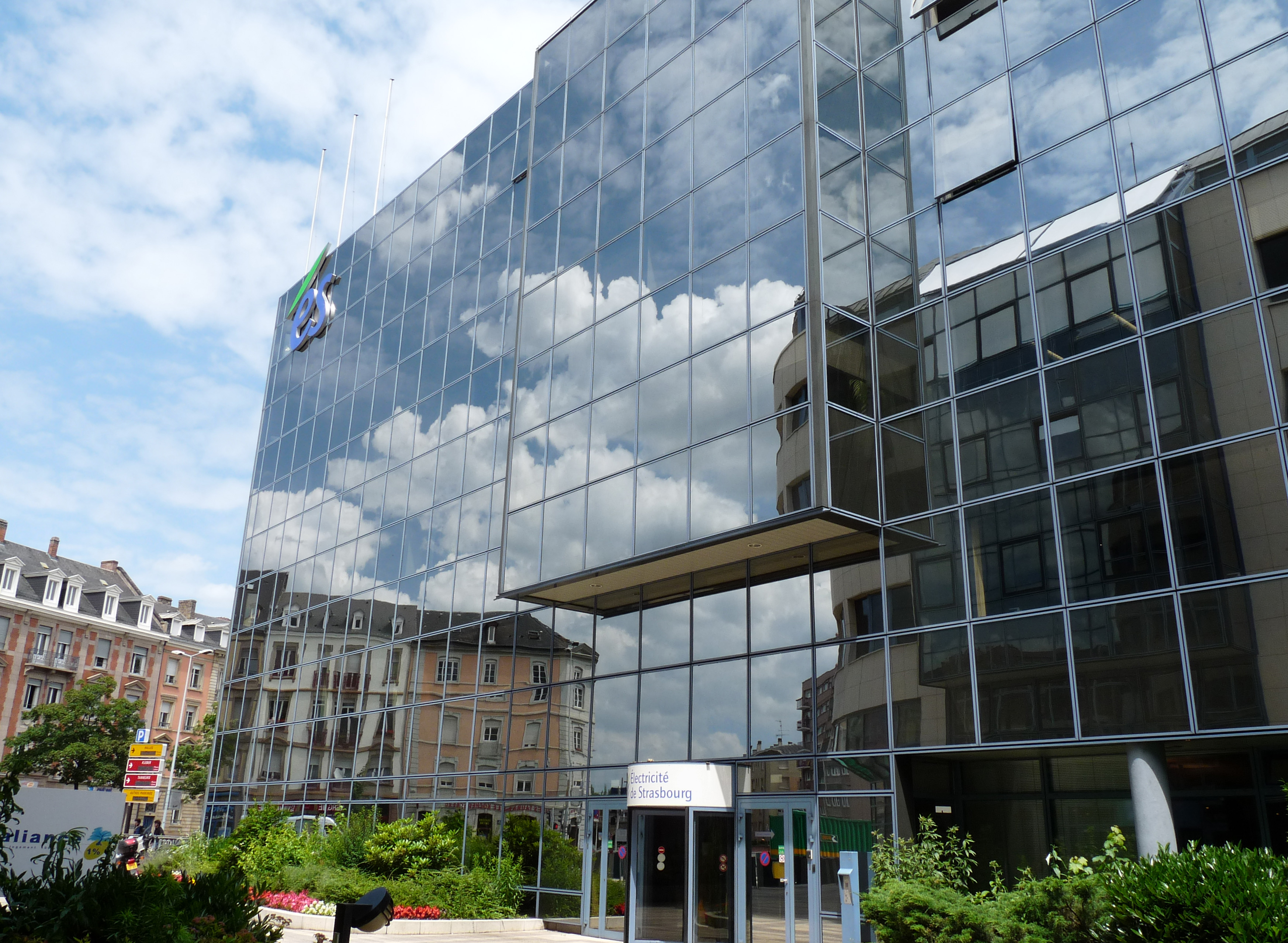 Siège social de l'Electricité de Strasbourg, boulevard du président Wilson